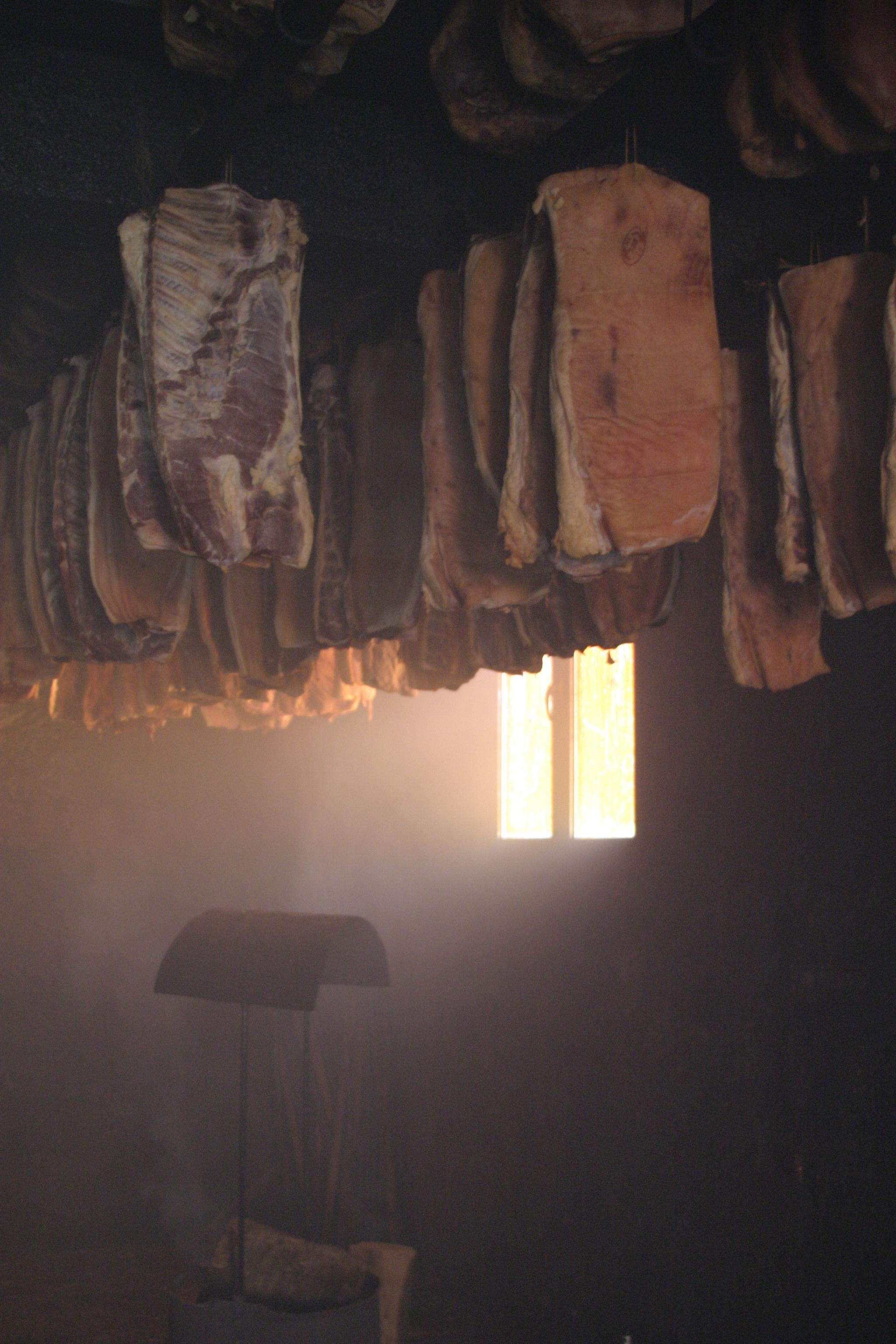 Пршут в процессе копчения